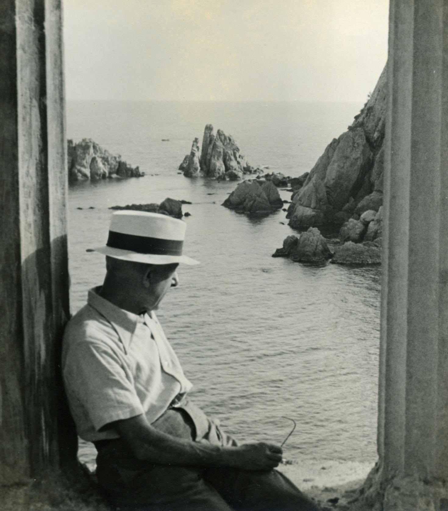 Carl Faust al Jardí Marimurtra